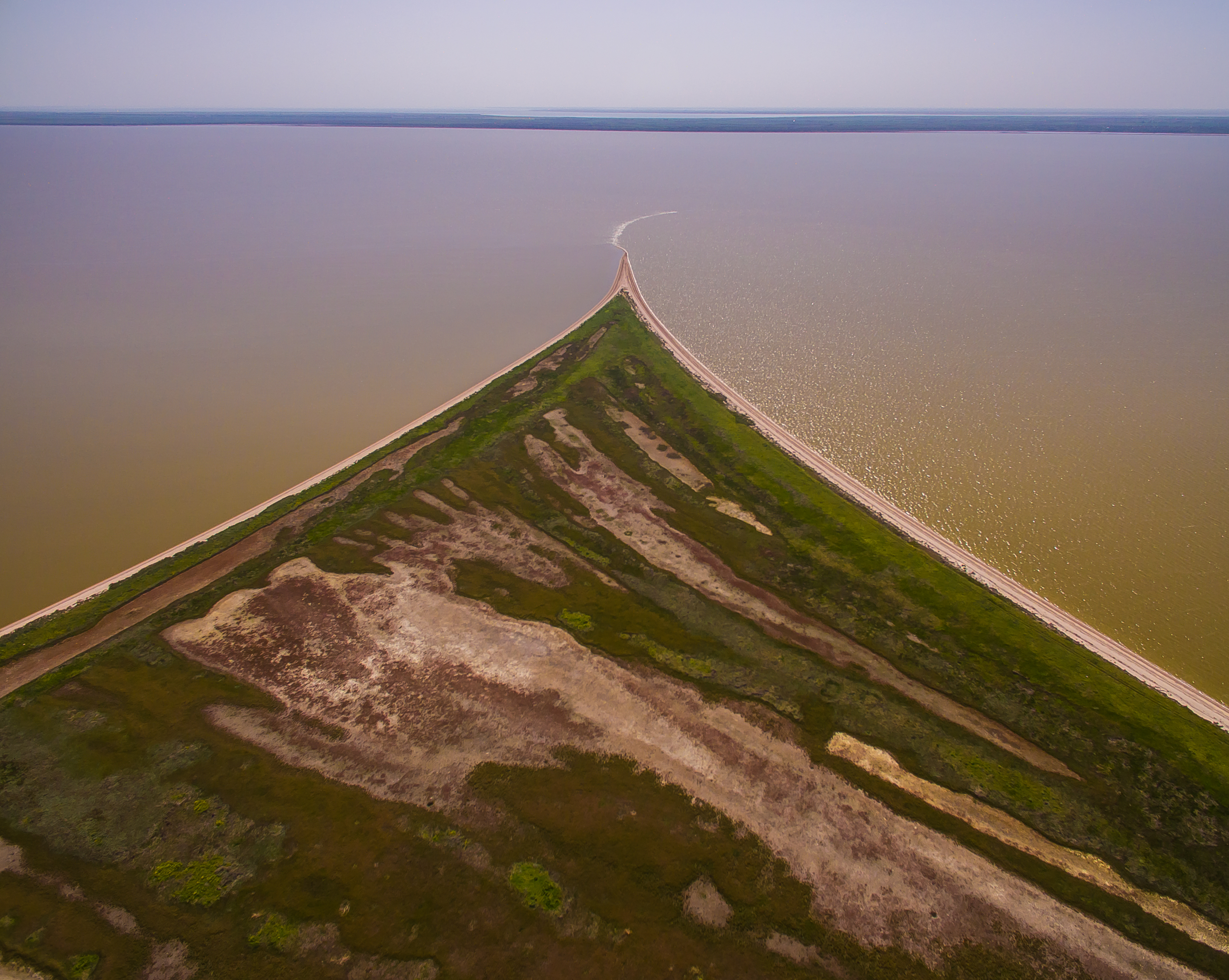 «Приазовський національний природний парк», Бердянський, Мелітопольський, Приазовський райони, міста Бердянськ та Мелітополь